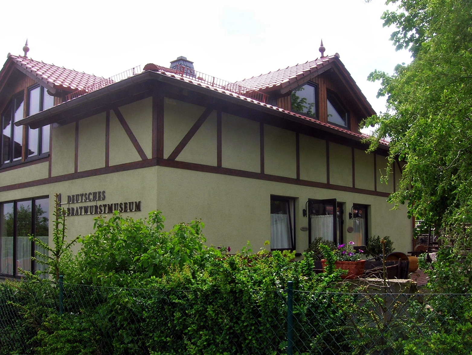 1. Deutsches Bratwurstmuseum in Holzhausen im Thüringer Ilm-Kreis